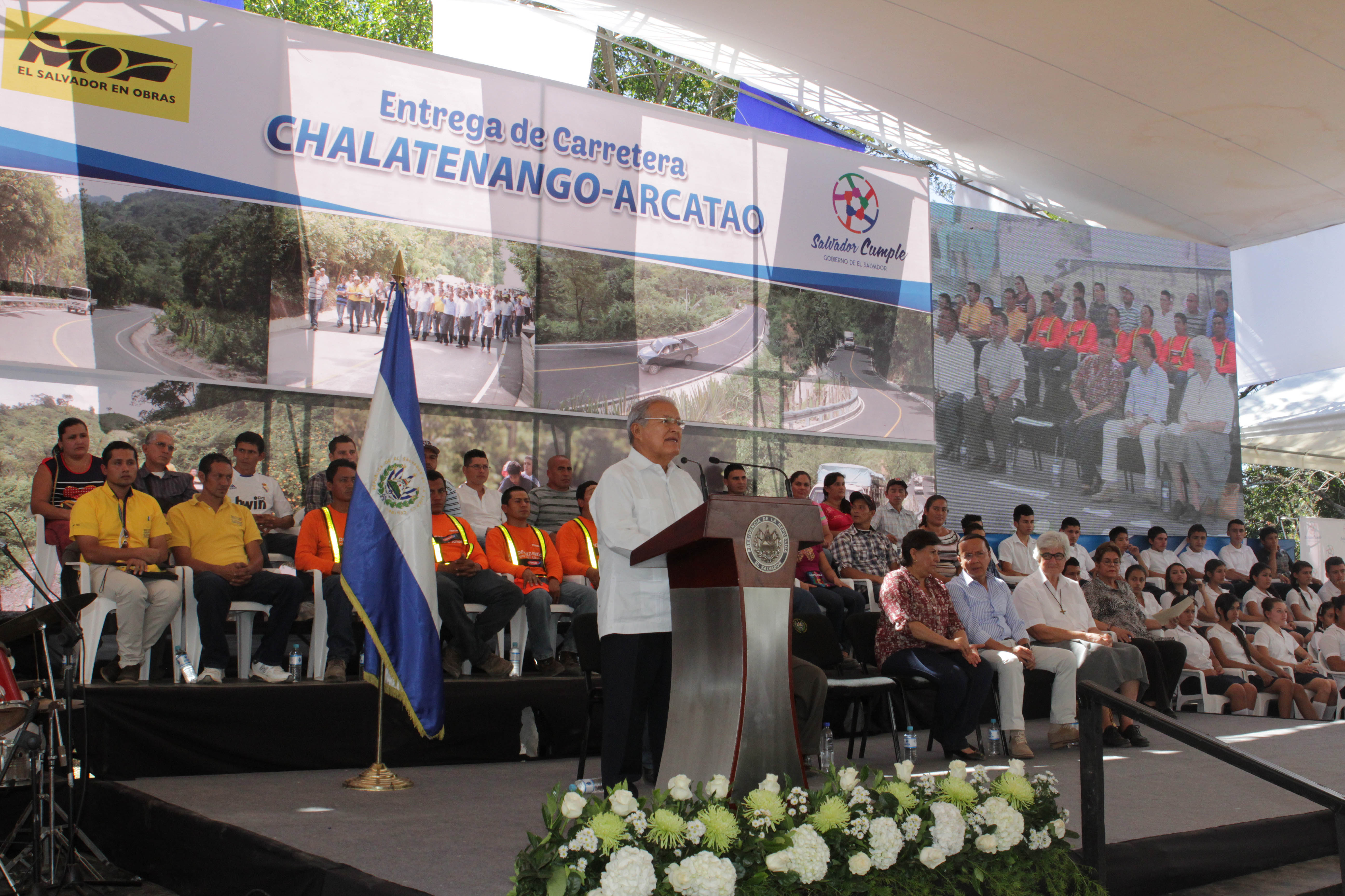 Presidente Salvador Sánchez Cerén .